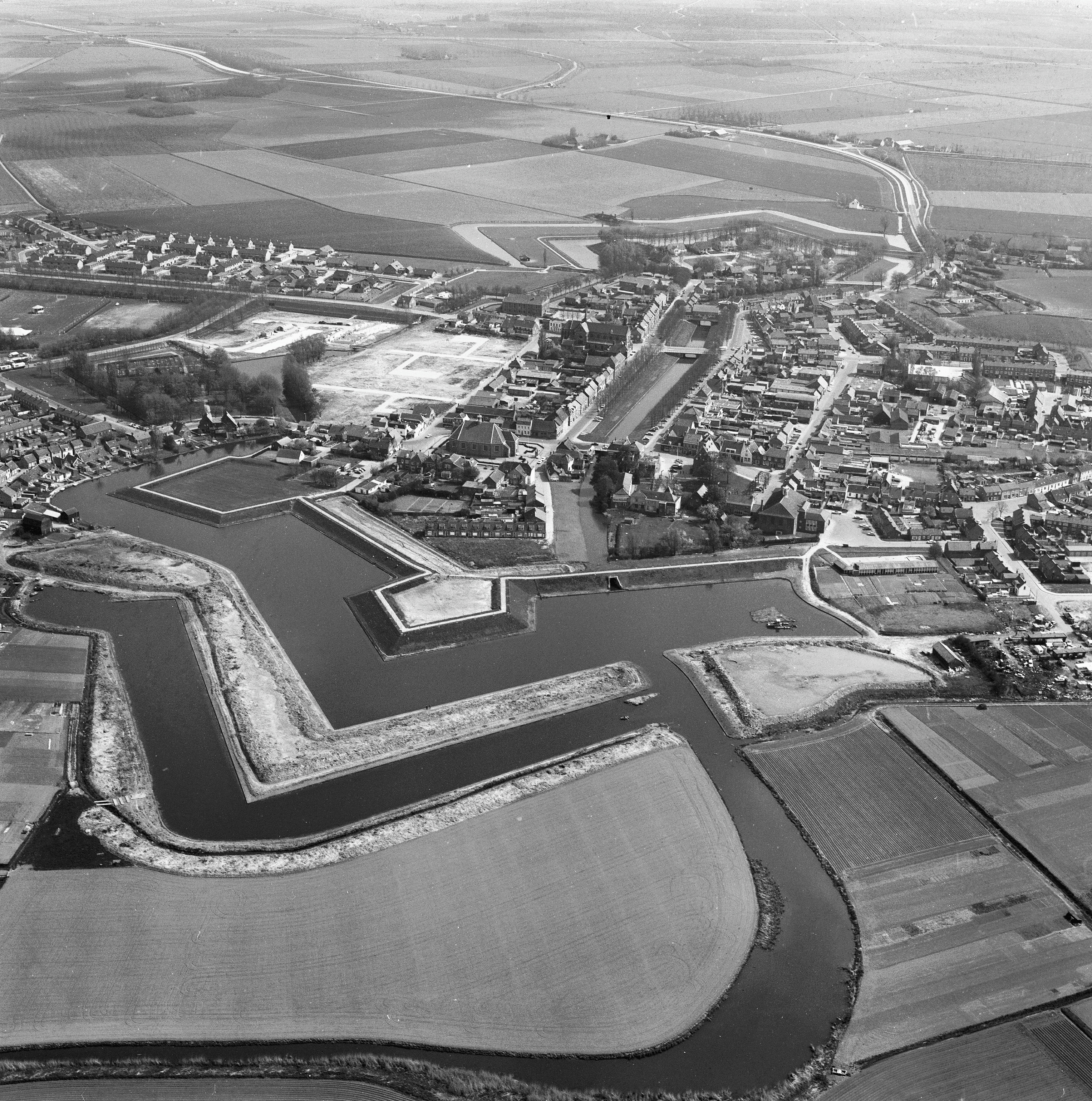 Plattegronden En Overzichten: luchtfoto's